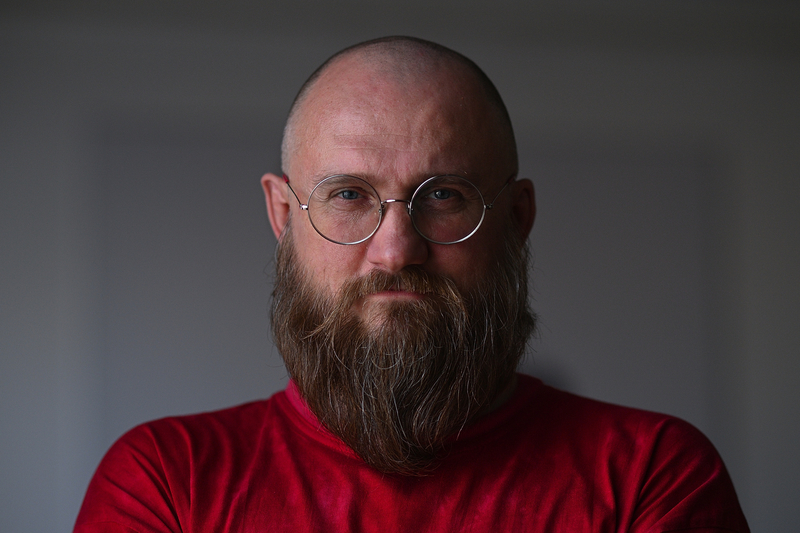 Сергей Бурлаков